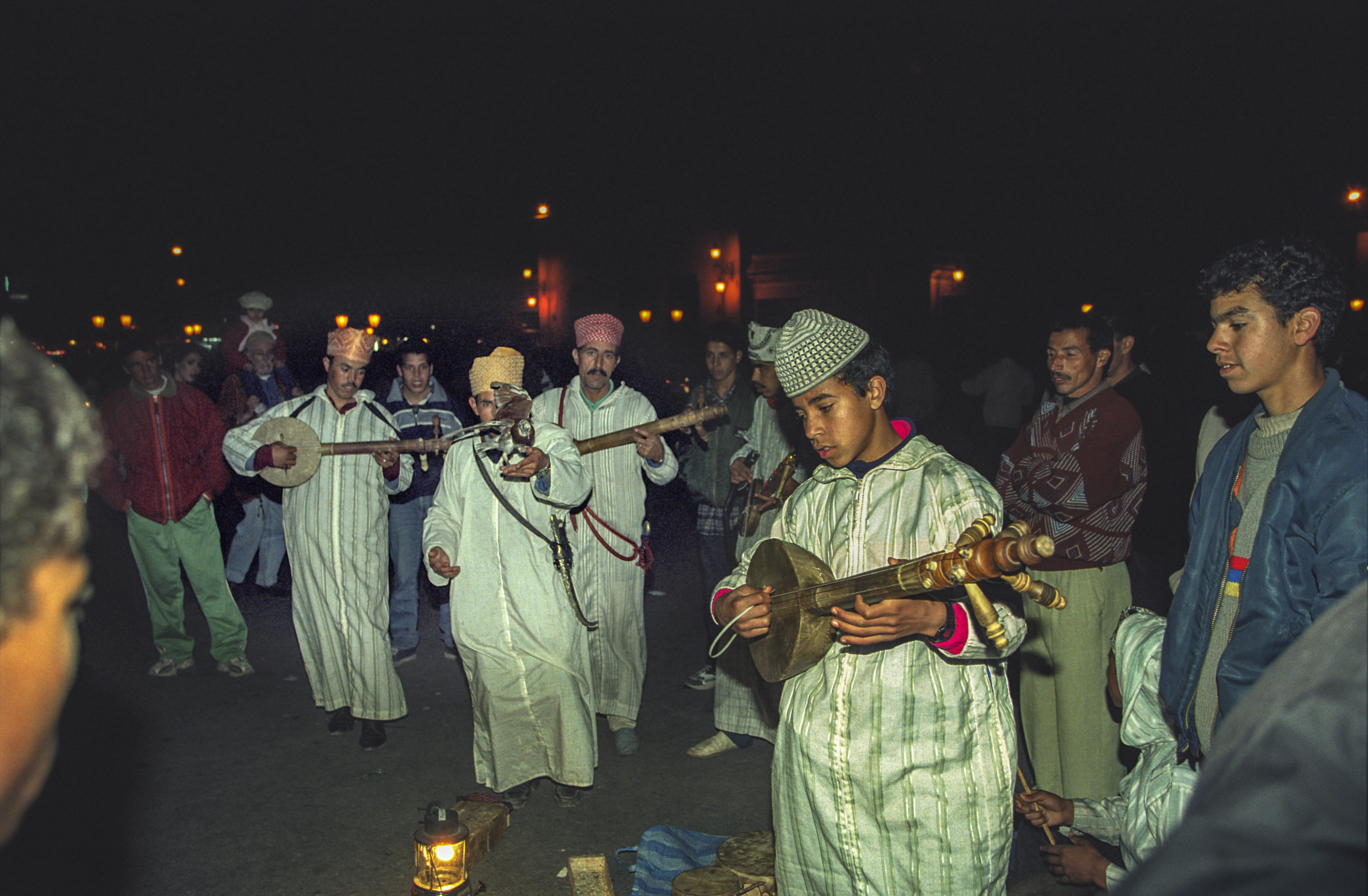 Djemaa el Fna, Marrakesh, taniec z sokołem